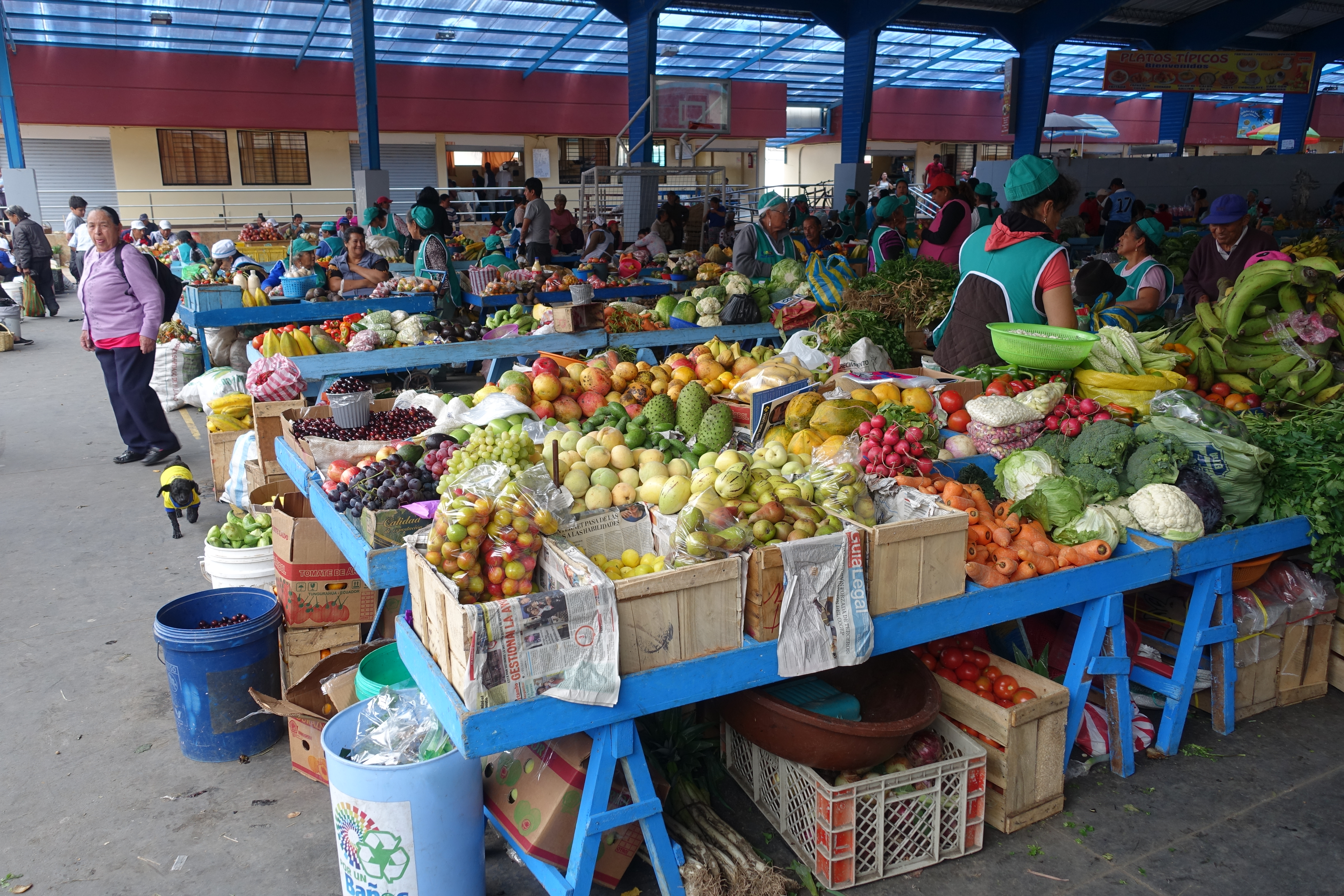 Markthalle in Baños de Agua Santa, Ecuador